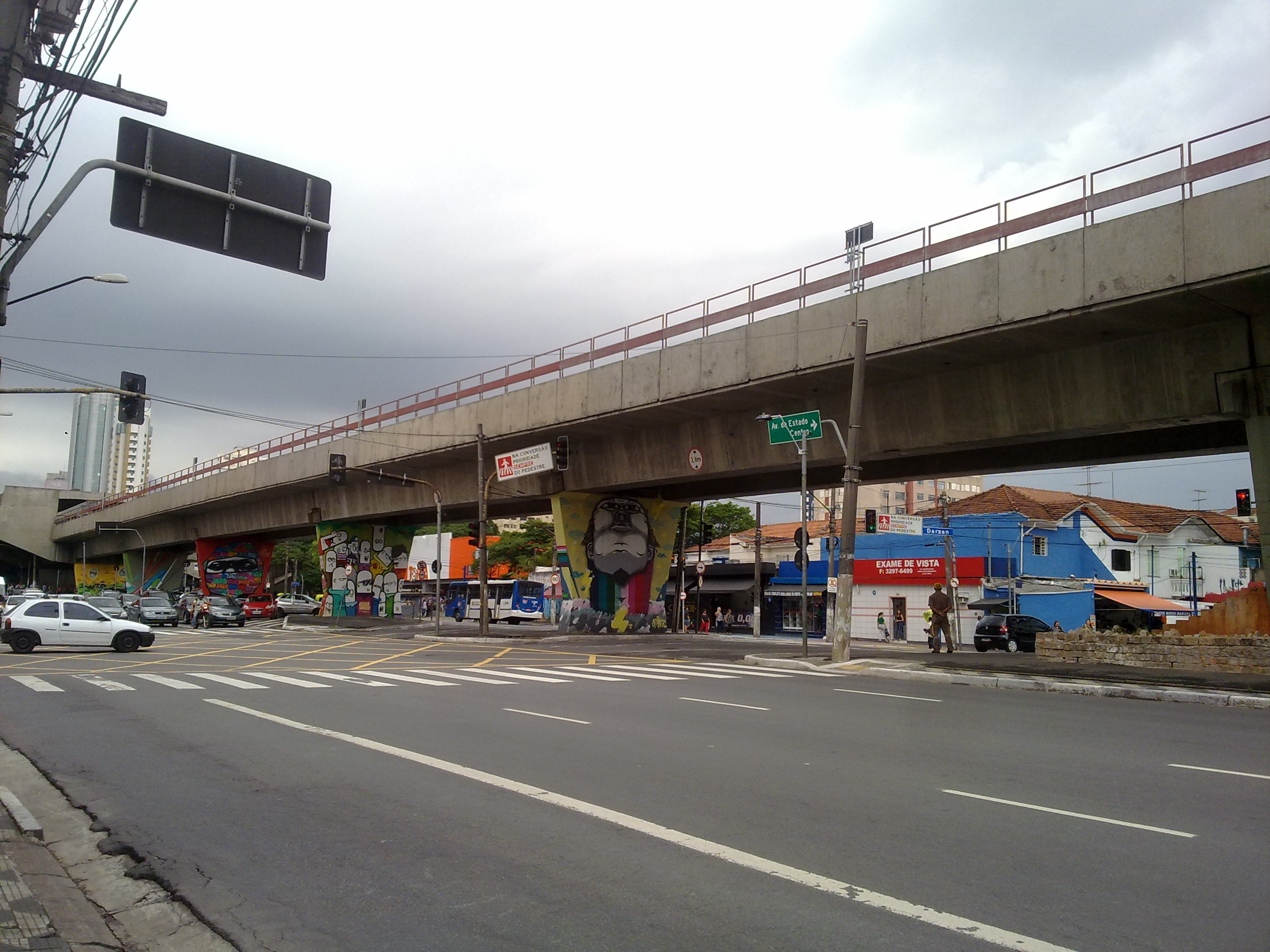 Museu Aberto de Arte Urbana de São Paulo, Santana, Zona Norte de São Paulo, Brasil.